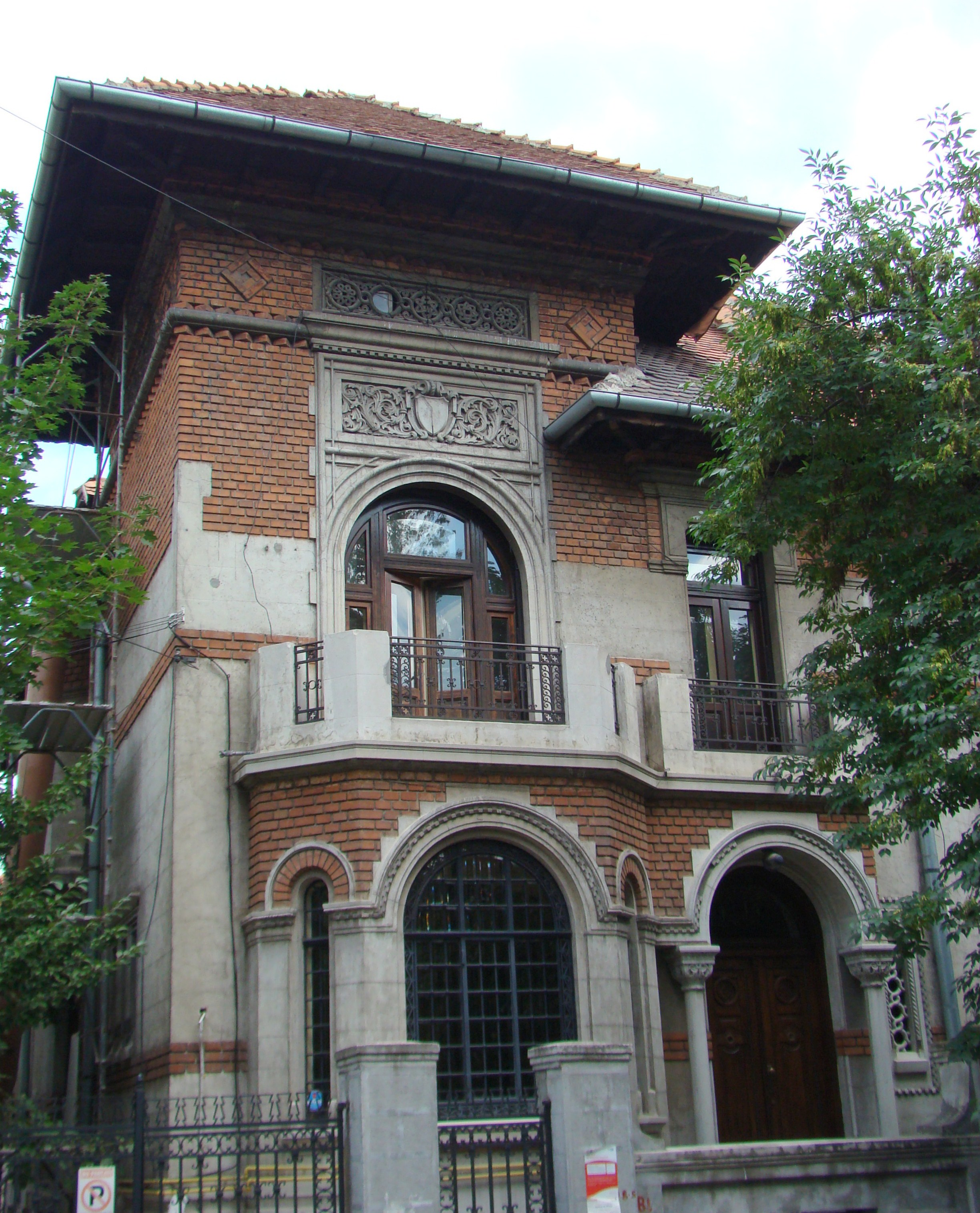 Casă monument istoric, str.Londra, nr.36